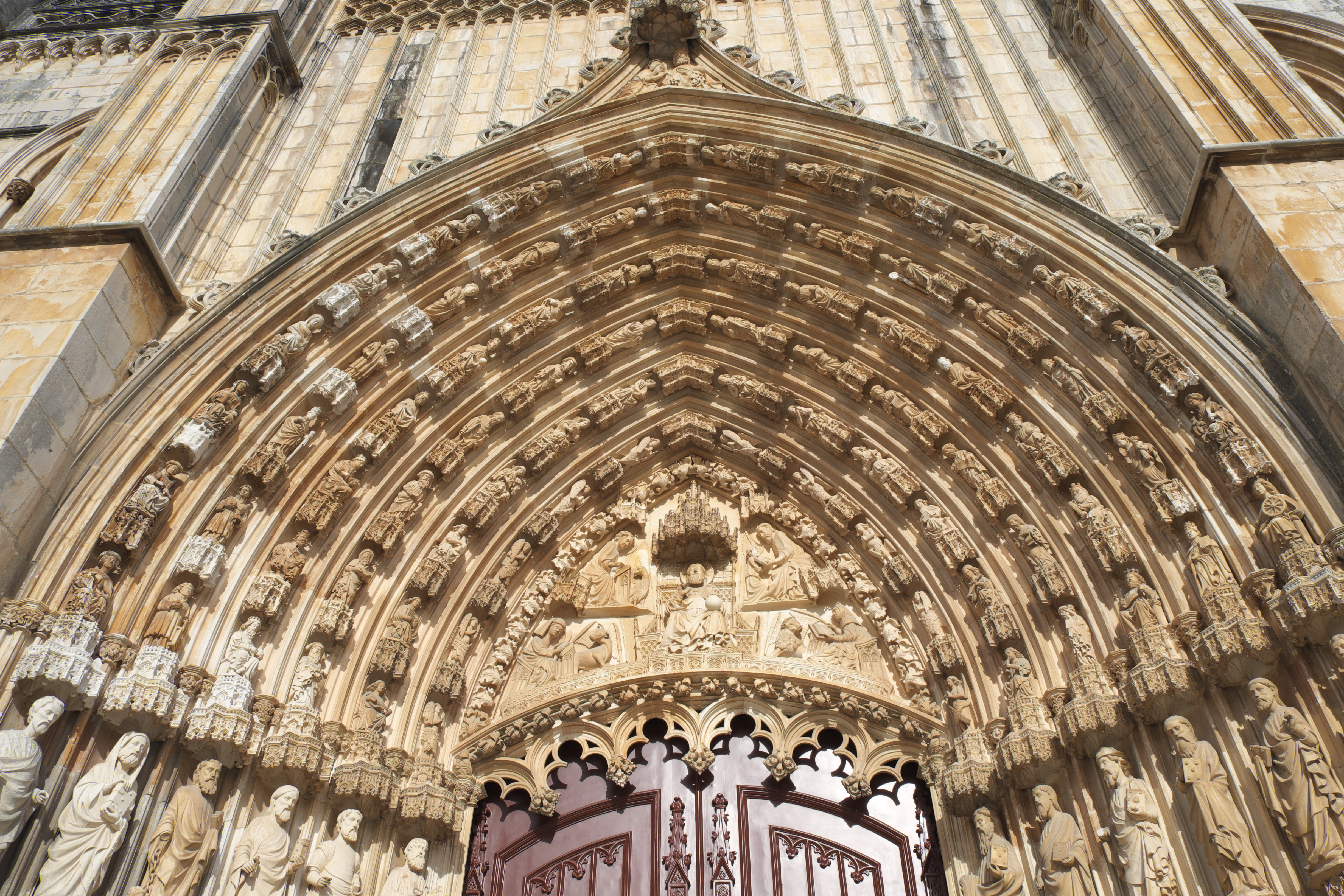 Klosterkirche des ehemaligen Dominikanerklosters Santa Maria da Vitória in Batalha im Distrikt Leiria (Portugal), Skulpturen am Portal